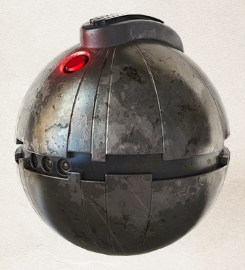 Thermal-Detonator in der Standard-Version